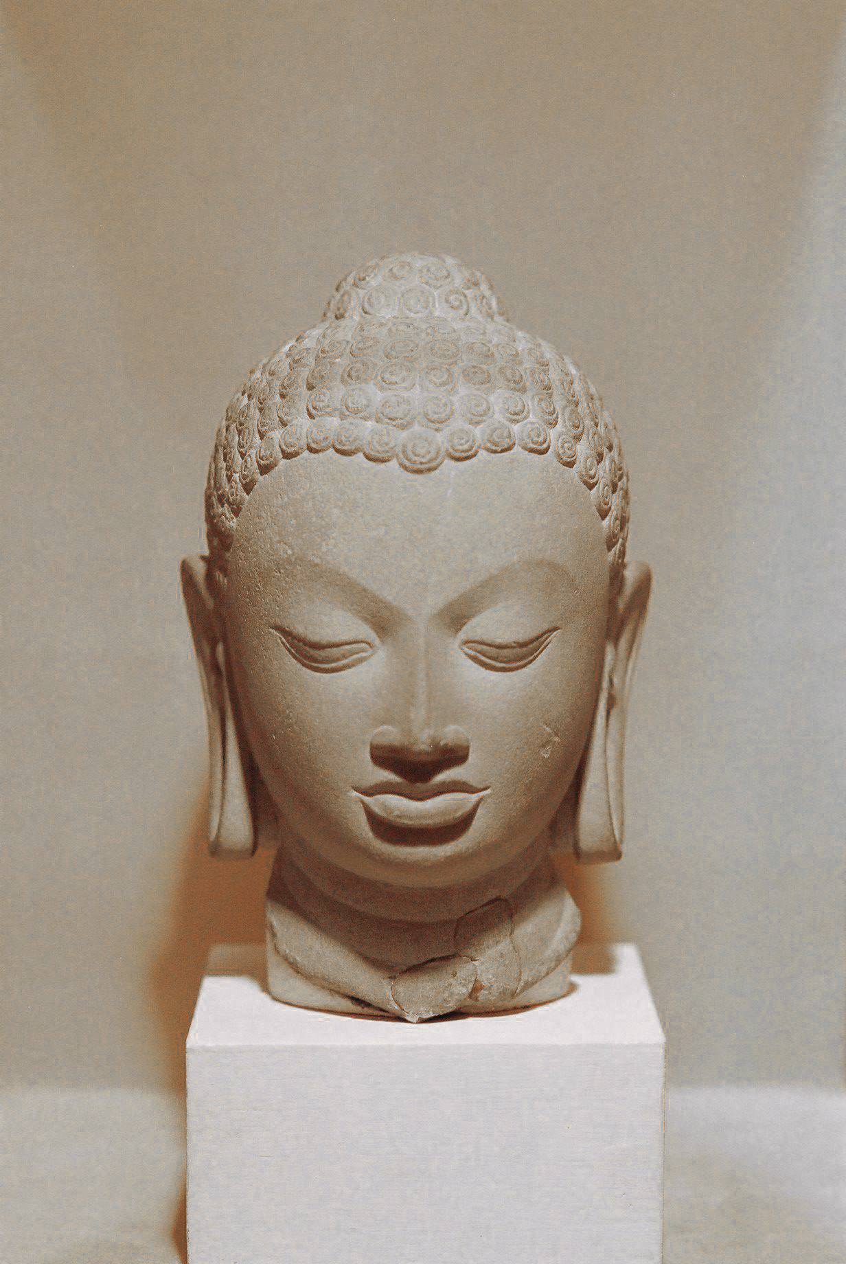 仏頭(5世紀 サールナート出土) (2005/01/22 National Museum, Delhi, INDIA)